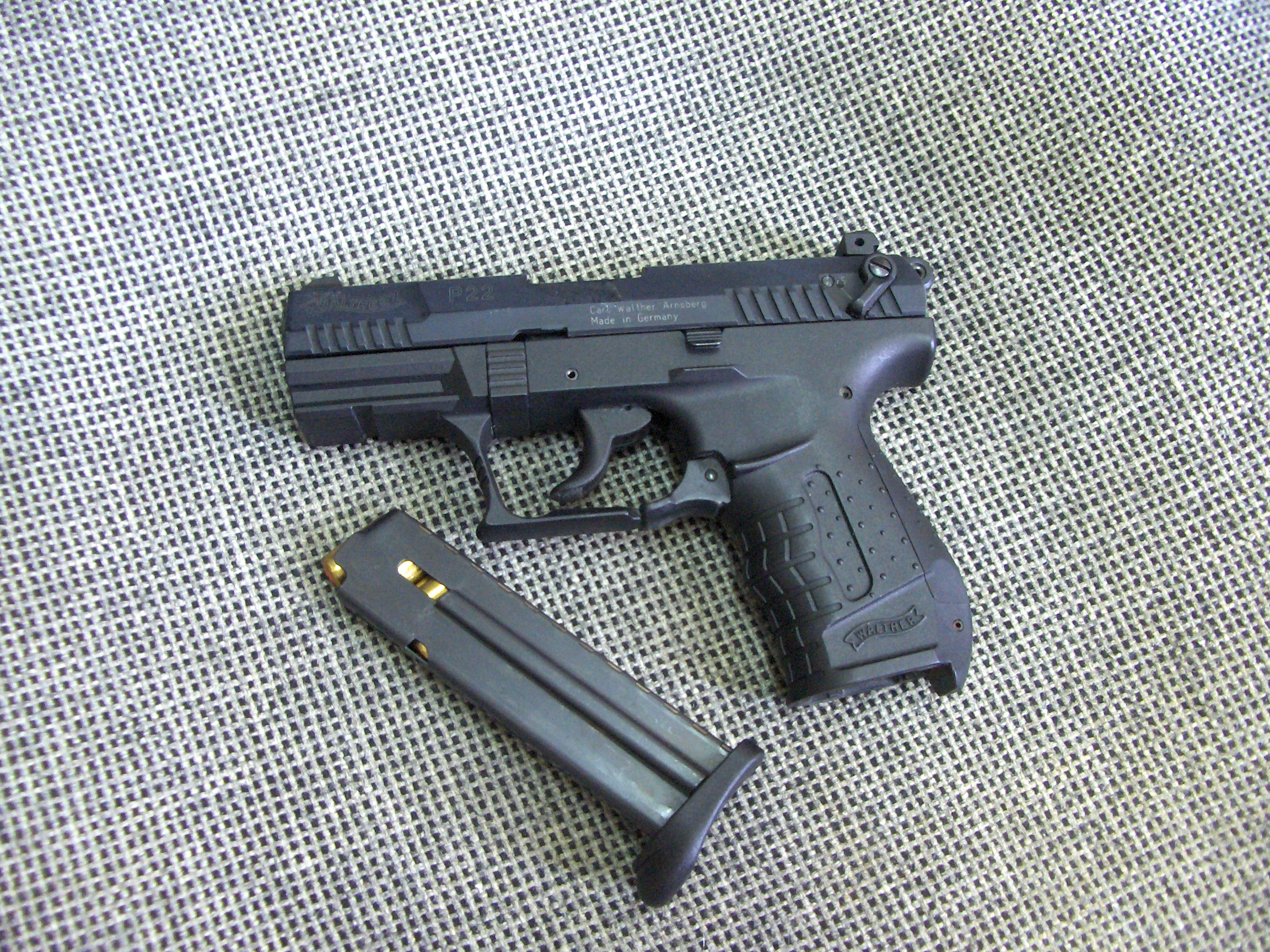 Umarex gyártmányú Walter P22 gázpisztoly + tár (7db PV tölténnyel)